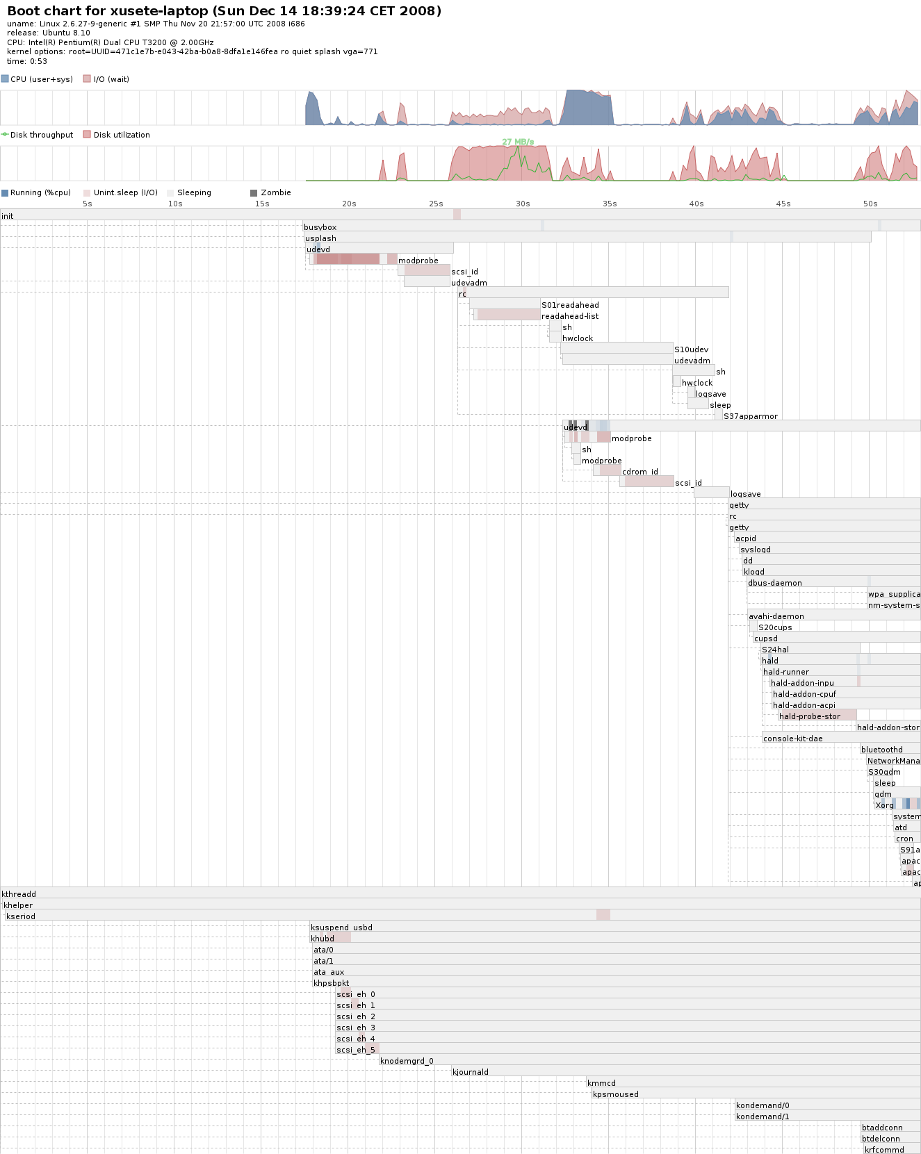 Grafico de un analisis de arranque de un sistema operativo